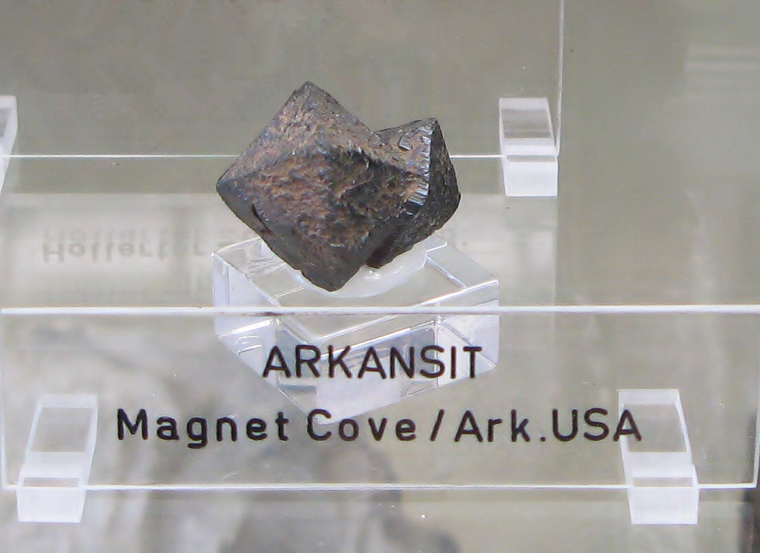 Brookit, Varietät Arkansit - Fundort: Magnet Cove, Arkansas, USA - Ausgestellt im Mineralogischen Museum Bonn